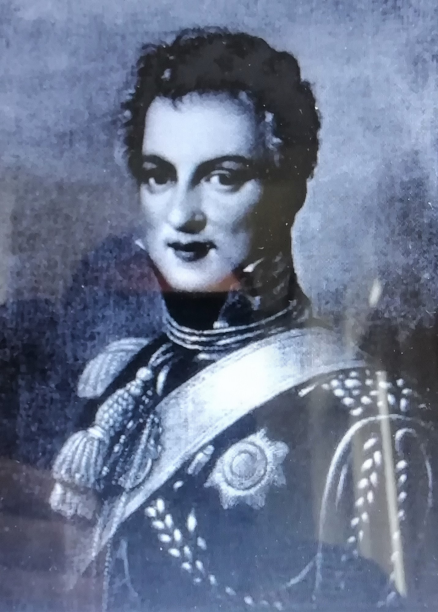 Clément de Saxe (1798-1822)